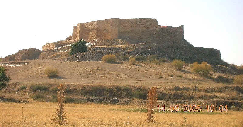 Panoramica del Castillo de los Casares (Munera)